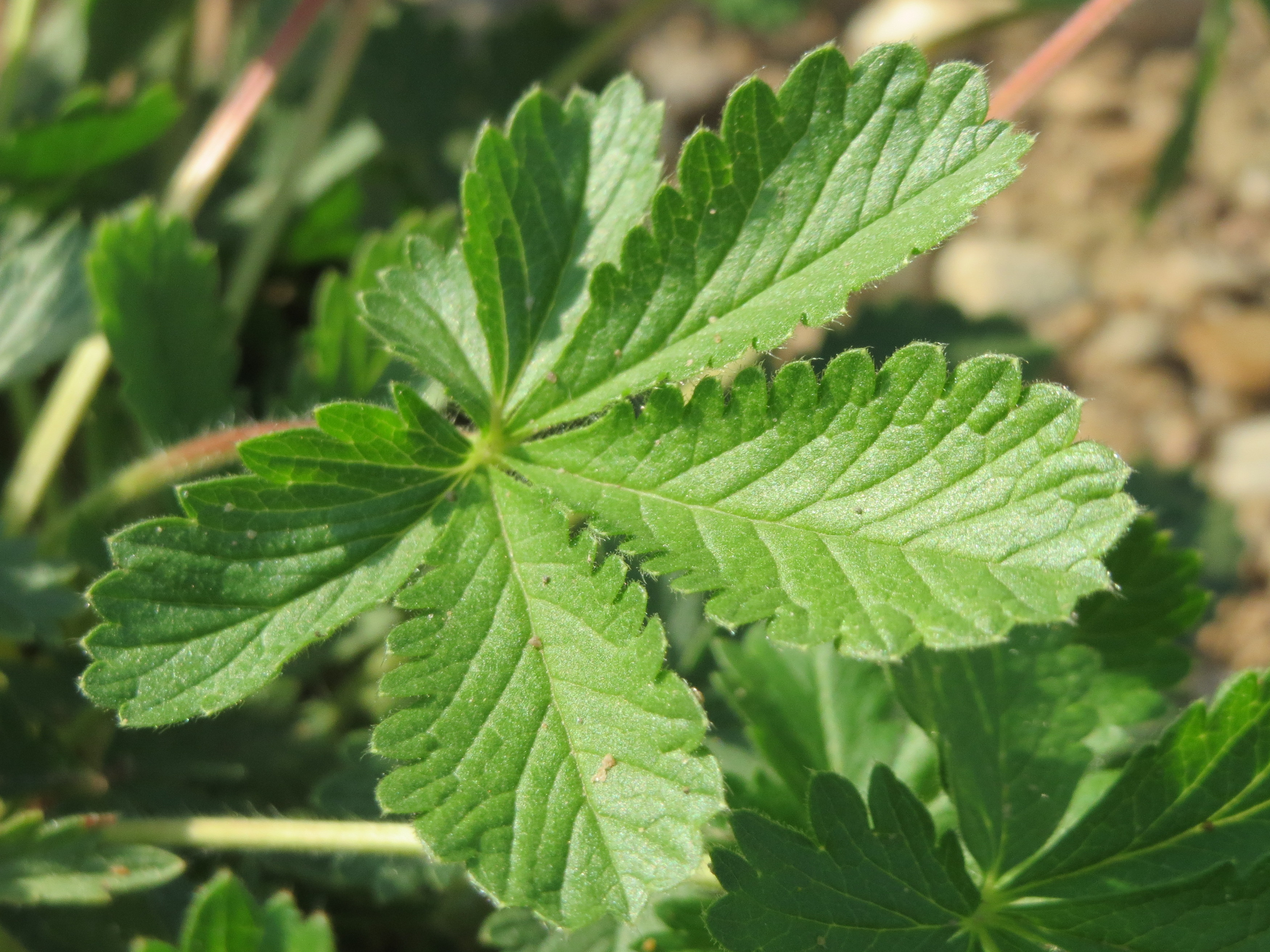 Hohes Fingerkraut (Potentilla recta) auf einem Sandhügel einer Baustelle in Hockenheim